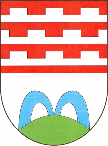 znak,Heratlice , okres Třebíč